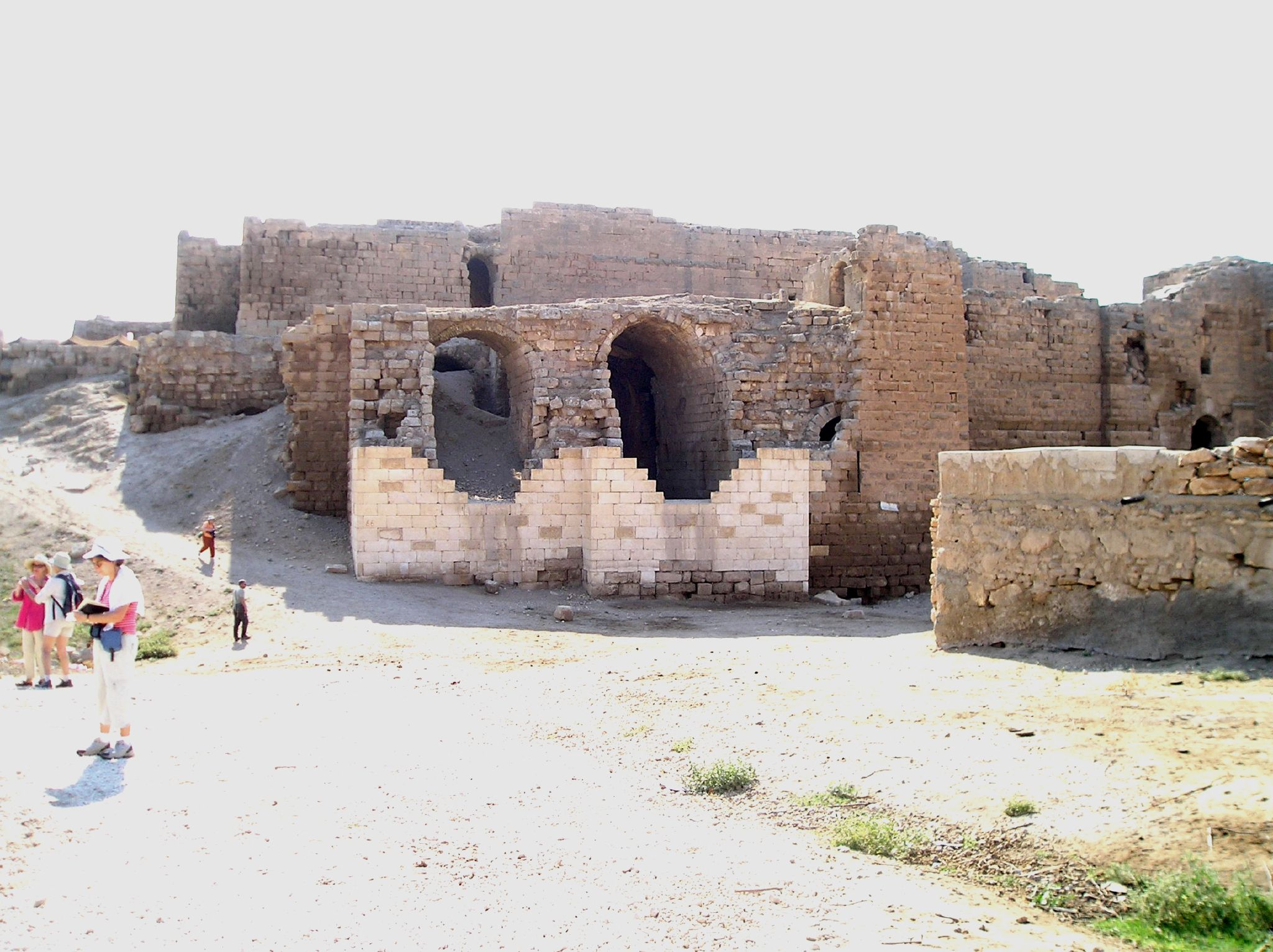 Harran Harran, Şanlıurfa